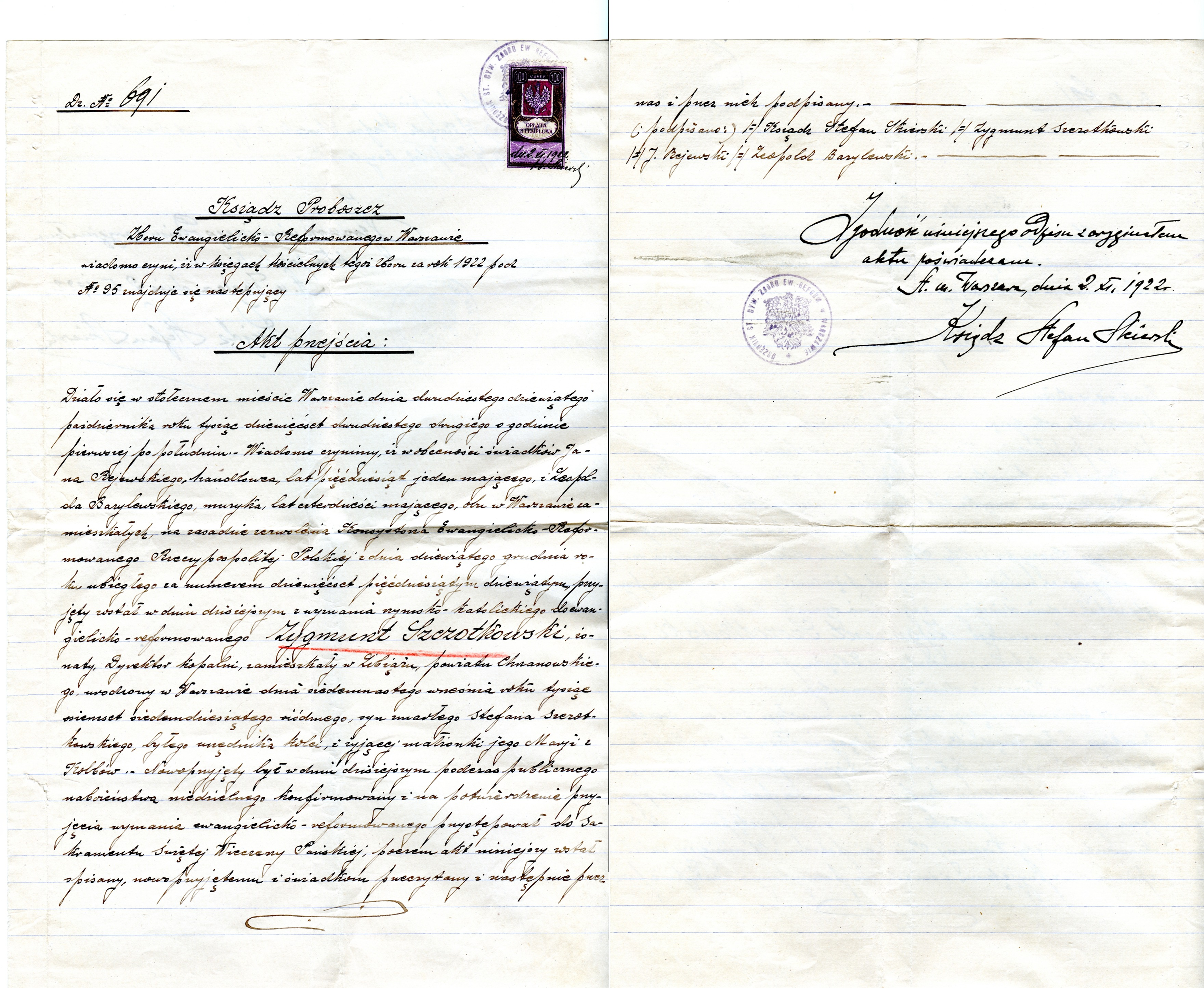 Akt przejścia Zygmunta Szczotkowskiego na kalwinizm, wydany 2 listopada 1922 przez Urząd Stanu Cywilnego Zboru Ewangelicko-Reformowanego w Warszawie